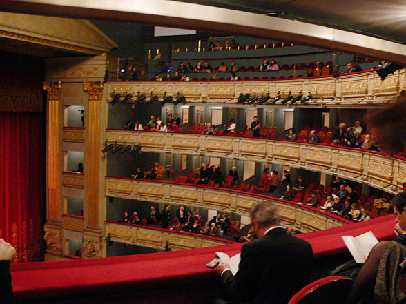 Teatro Real, Madrid: Auditorium